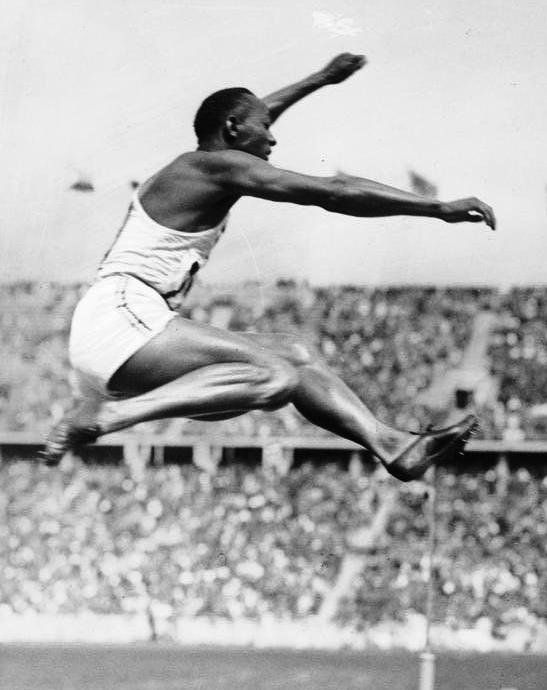 Berlin, Olympiade, Jesse Owens beim Weitsprung Jesse Owens beim Weitsprung [Berlin.- Olympische Sommerspiele, Jesse Owens beim Weitsprung] Abgebildete Personen: Owens, Jesse: Leichtathlet, Olympiateilnehmer 1936, USA (GND 118738917)